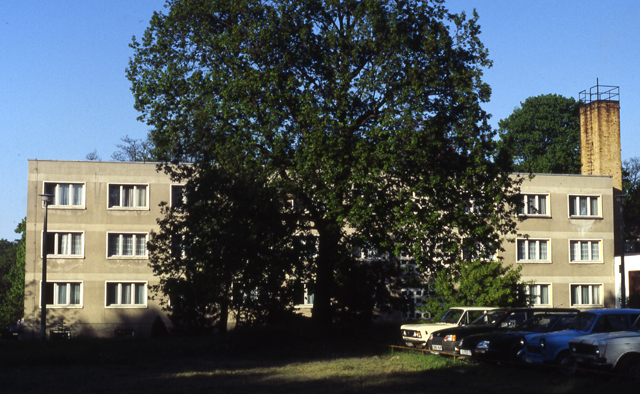 Akademie der Landwirtschaftswissenschaften der DDR